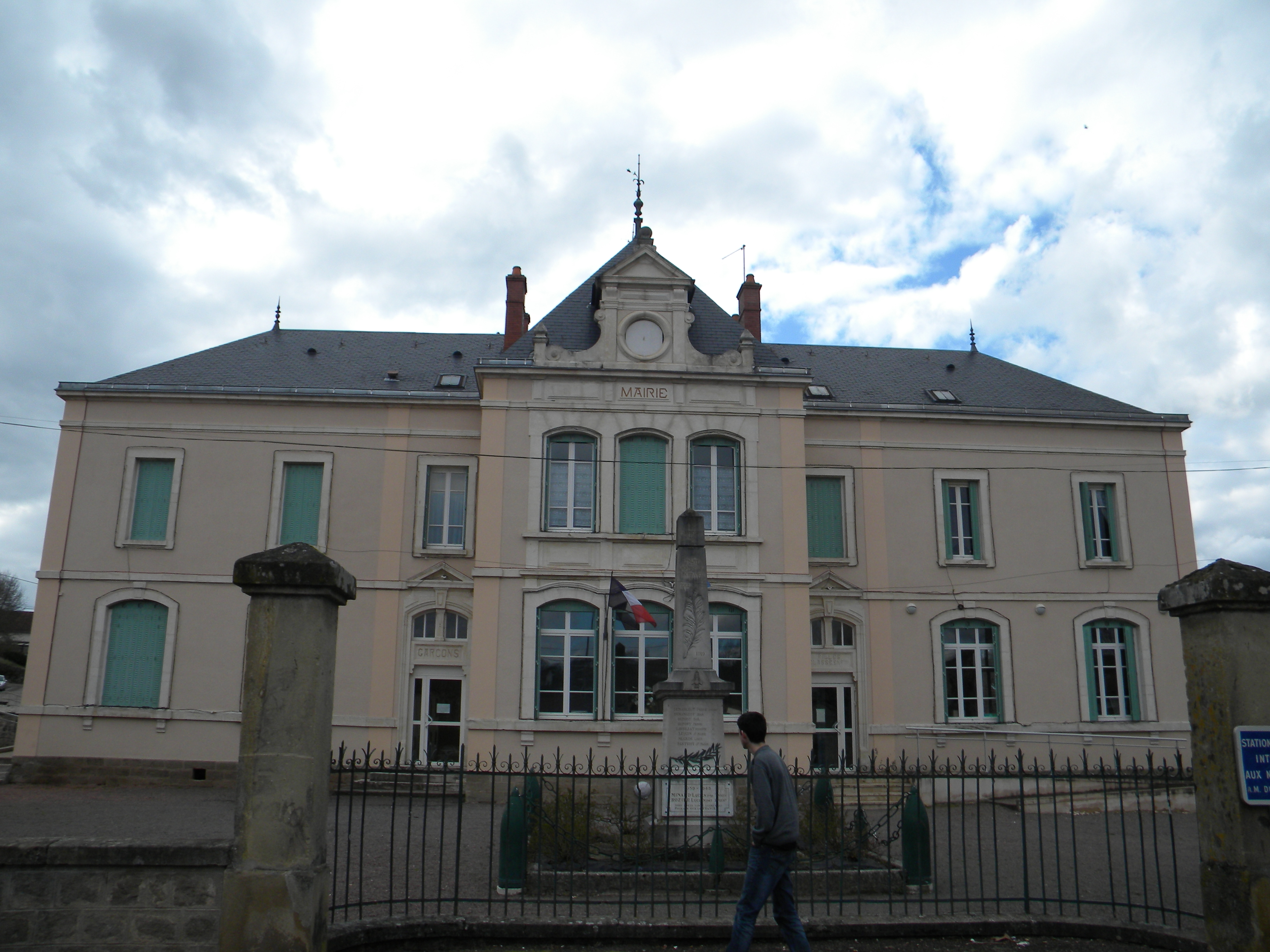 Urbodomo de Thury